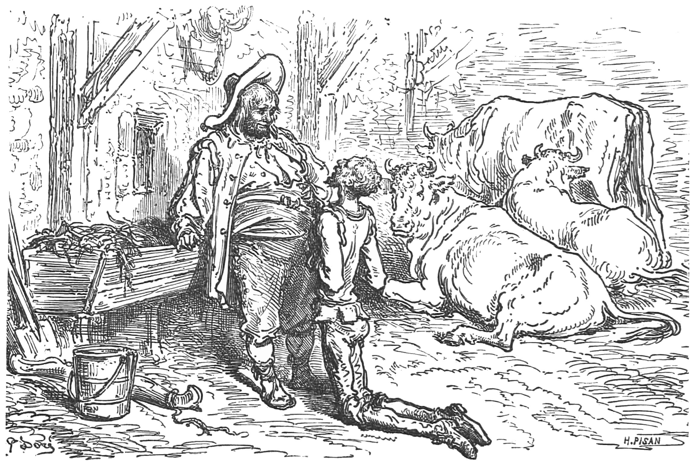 "Quixote e o estalajadeiro" (1863), iIustração por Gustave Doré para “Don Quixote“ de Miguel de Cervantes.